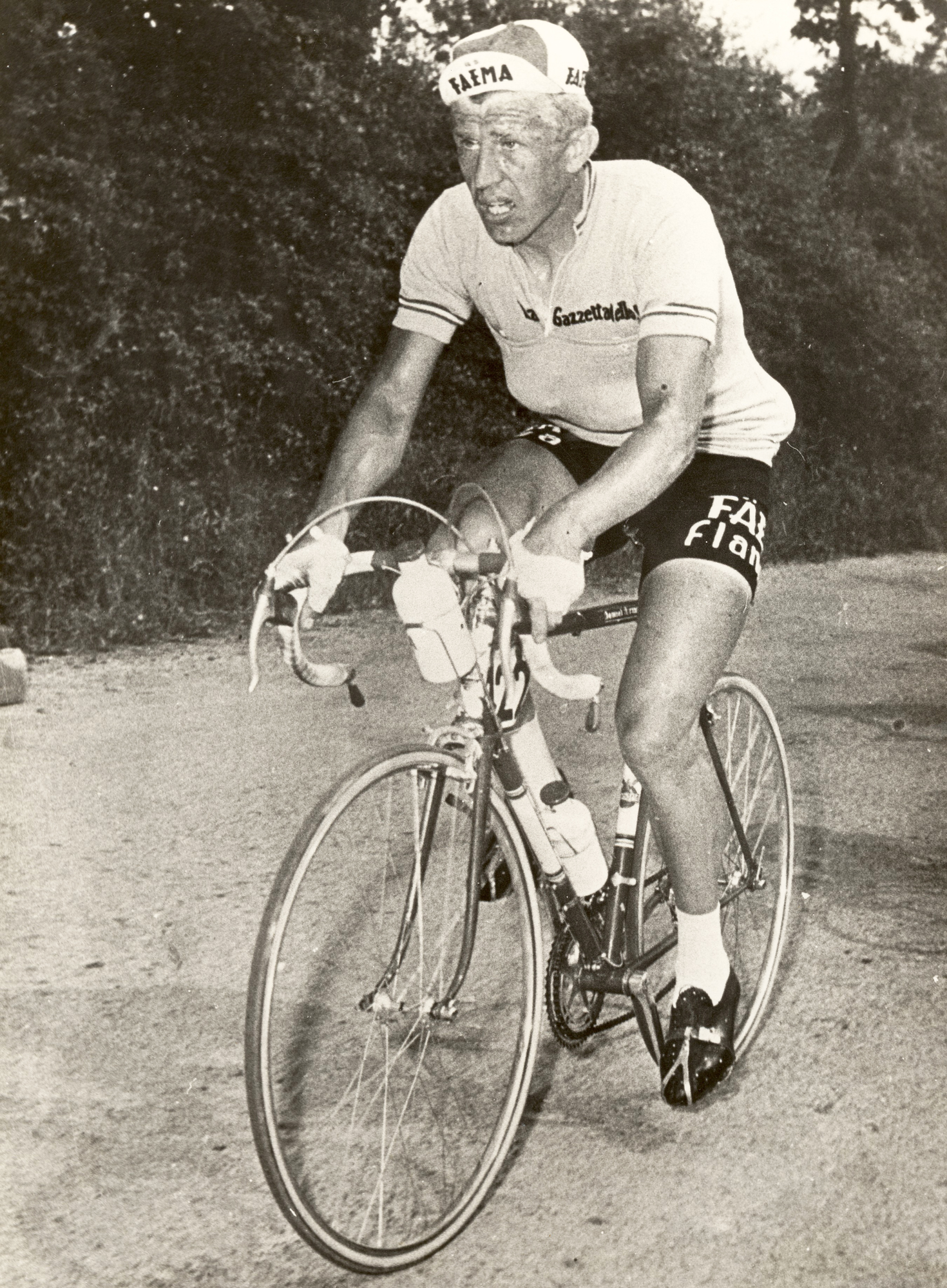 Armand Desmet (Waregem, 23 januari 1931) is een voormalig Vlaams wielrenner.